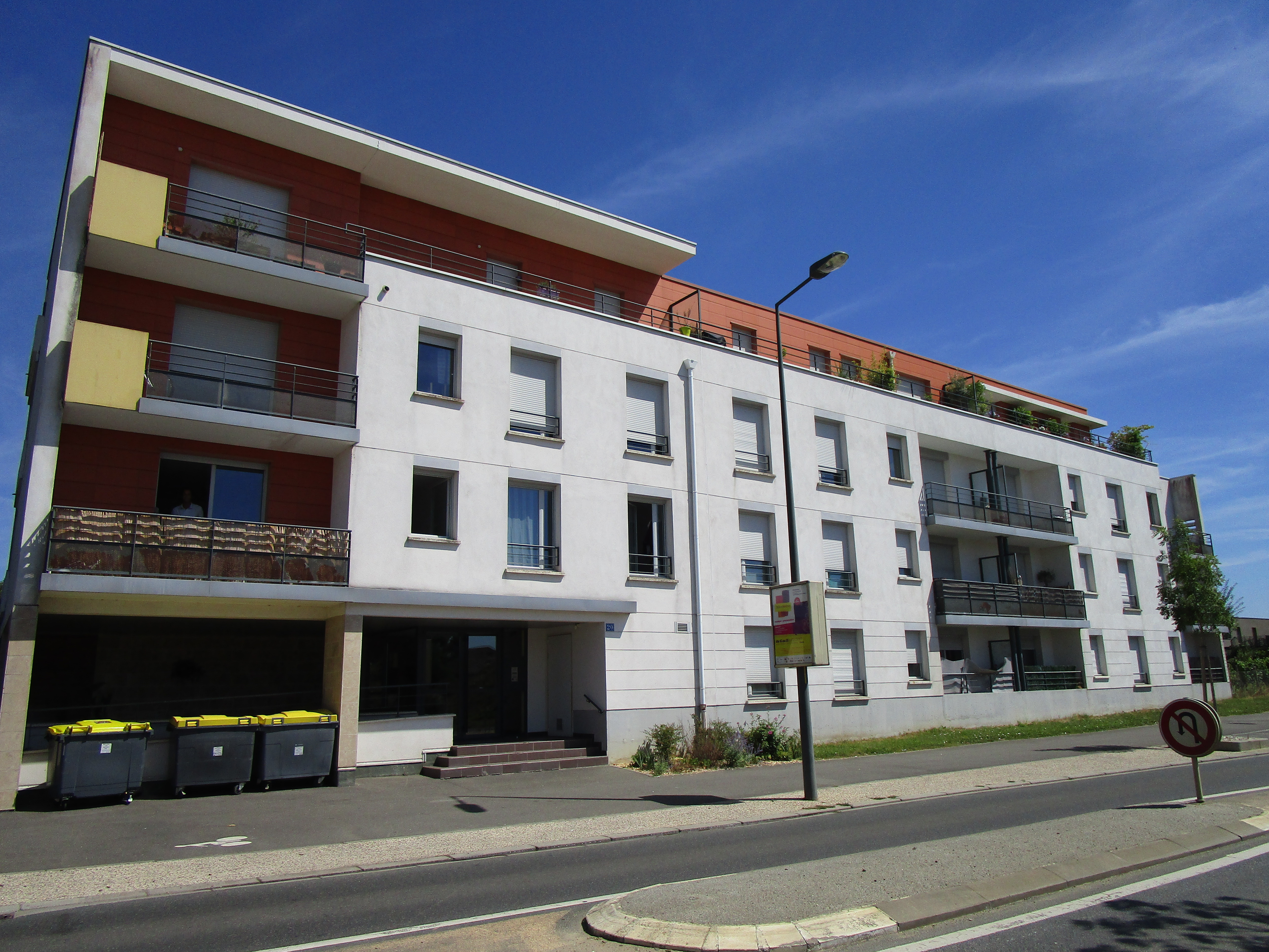 Résidence de La Rose des Vents au sein du quartier Monconseil, à Tours Nord.